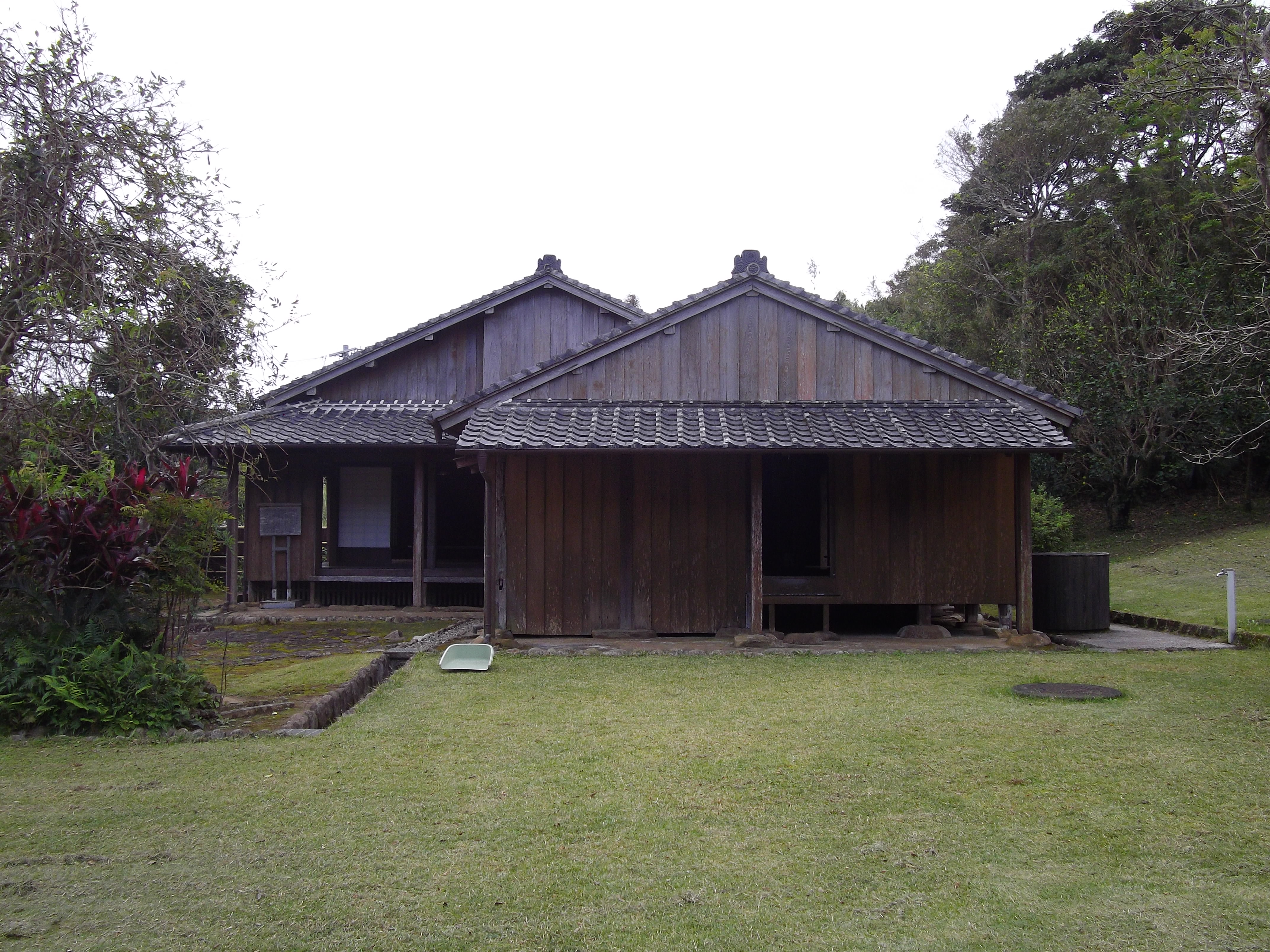 中種子古市